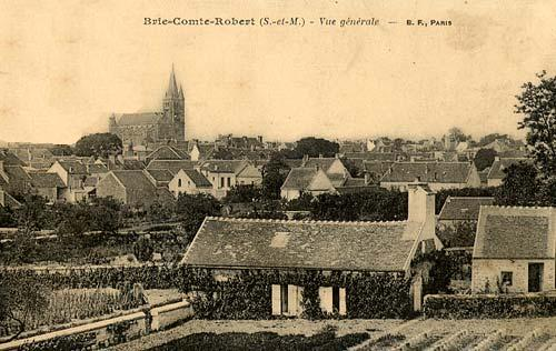 Vue générale de la commune, avant 1914.